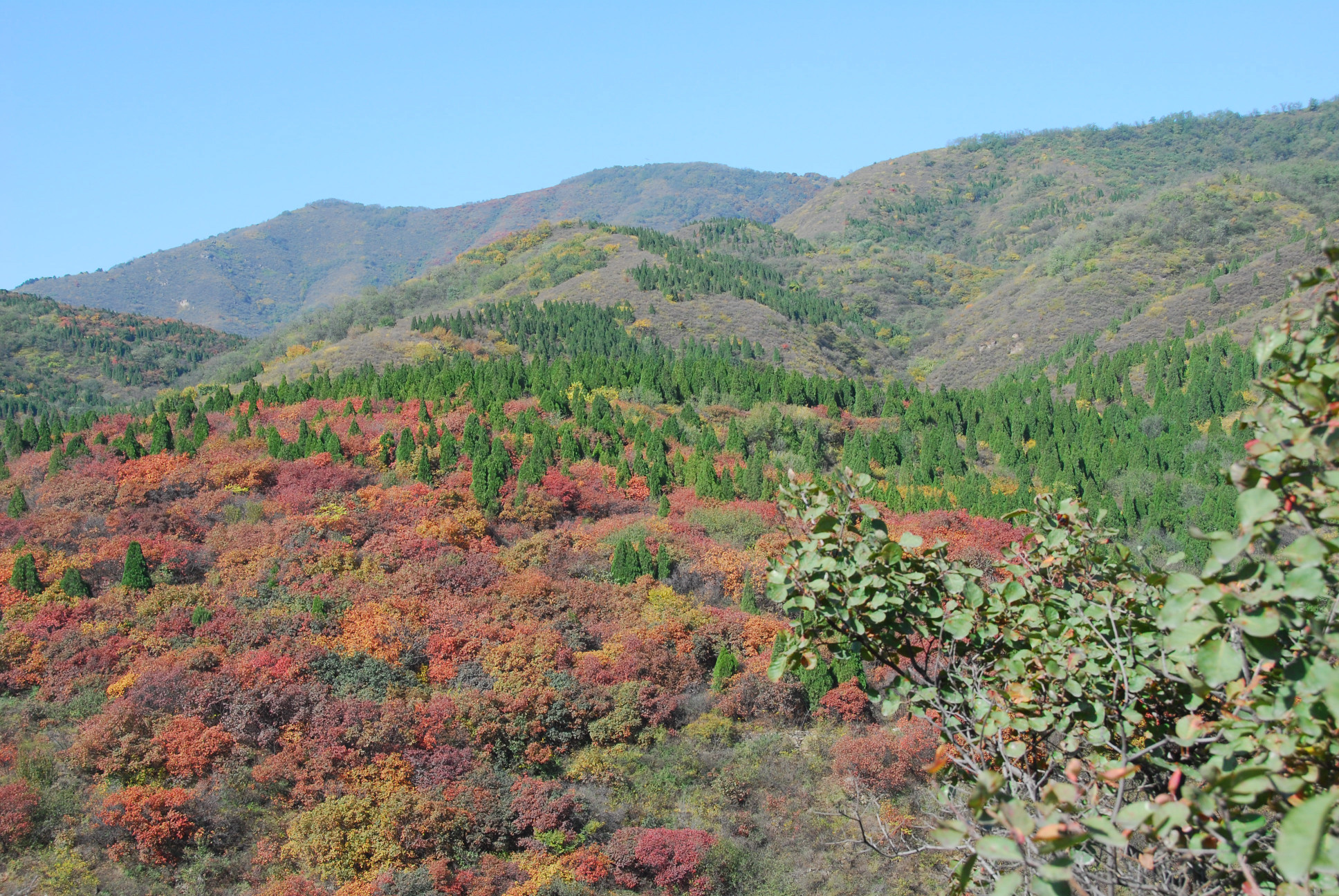 Shijingshan, Beijing, China